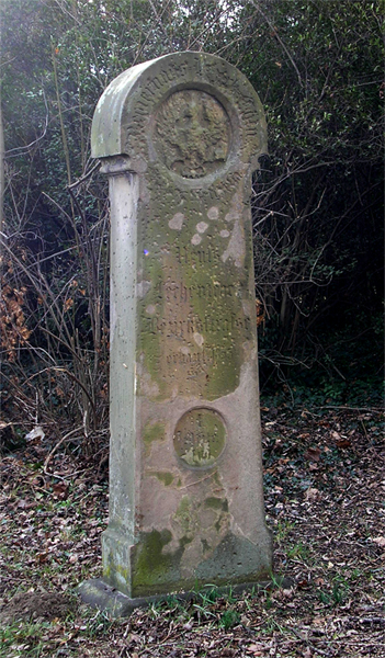 Preußischer Meilenstein von 1855 in Bergheim-Niederaußem, Baudenkmal-Nr. 31